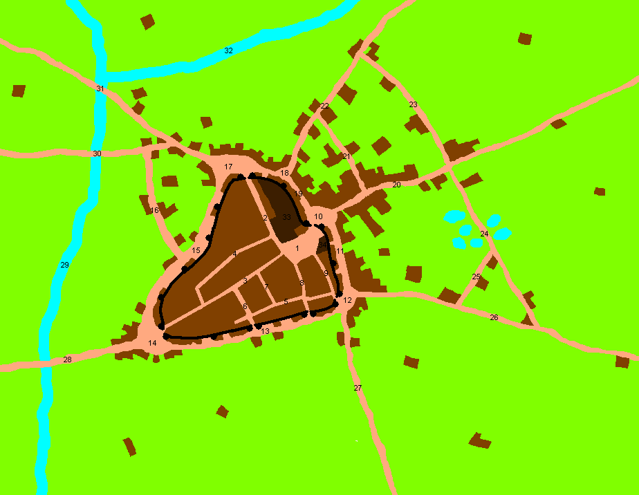 Mapa de la Terrassa medieval. Els números es corresponen a: 1. plaça vella 2. carrer de n'Aymerich (carrer Cremat) 3. carrer major 4. carrer de (l'hostal de) les parres 5. carrer de baix 6. carrer del forn 7. carrer de Miquel Bastard 8. carrer de Jaume Cantarer 9. carrer de Mosterol 10. pla de la creu 11. carrer de l'església 12. pla del portal nou 13. carrer del vall 14. pla del portal de sant Roc 15. carrer de fora muralles 16. carrer de la vila nova 17. portal de Montserrat (raval de Montserrat) 18. pla de la font robada 19. carrer dels occitans (carrer dels gavatxons) 20. carrer de la font vella 21. carrer de la palla 22. carrer de Sant Pere 23. carrer del cardaire de llana 24. carrer (de les basses) del puig novell 25. carrer del racó 26. carrer del portal nou 27. carrer (del joc) de la rutlla 28. carrer de sant roc 29. riera del Palau (la Rambla) 30. carrer de la goleta 31. camí de Montserrat 32. rasa de la riera 33. castell Palau 34. capella del Roser